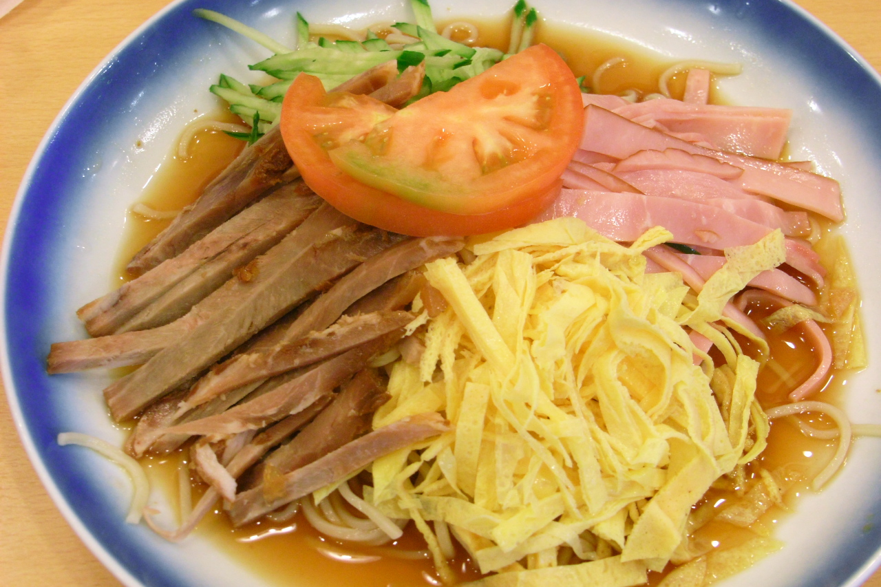 伊丹空港の551蓬莱で食べた冷麺。冷麺というメニュー名称だが、別に普通の冷やし中華。まあ、冷麺って食べたこと無いんだけど。冷やし中華、そろそろ終わり?